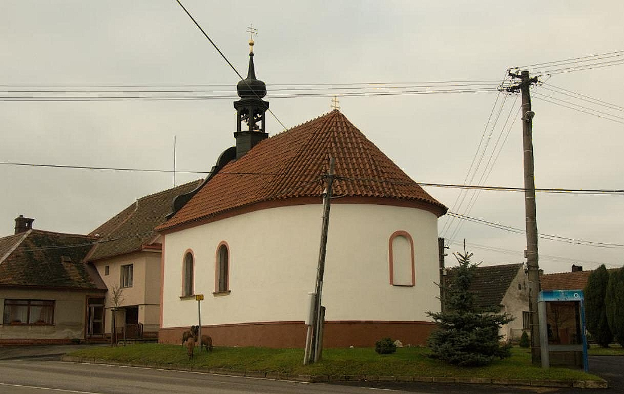 Kaple Panny Marie na návsi s ručně malovaným oltářem z Mrákotínské žuly, je vyhlášena kulturní památkou